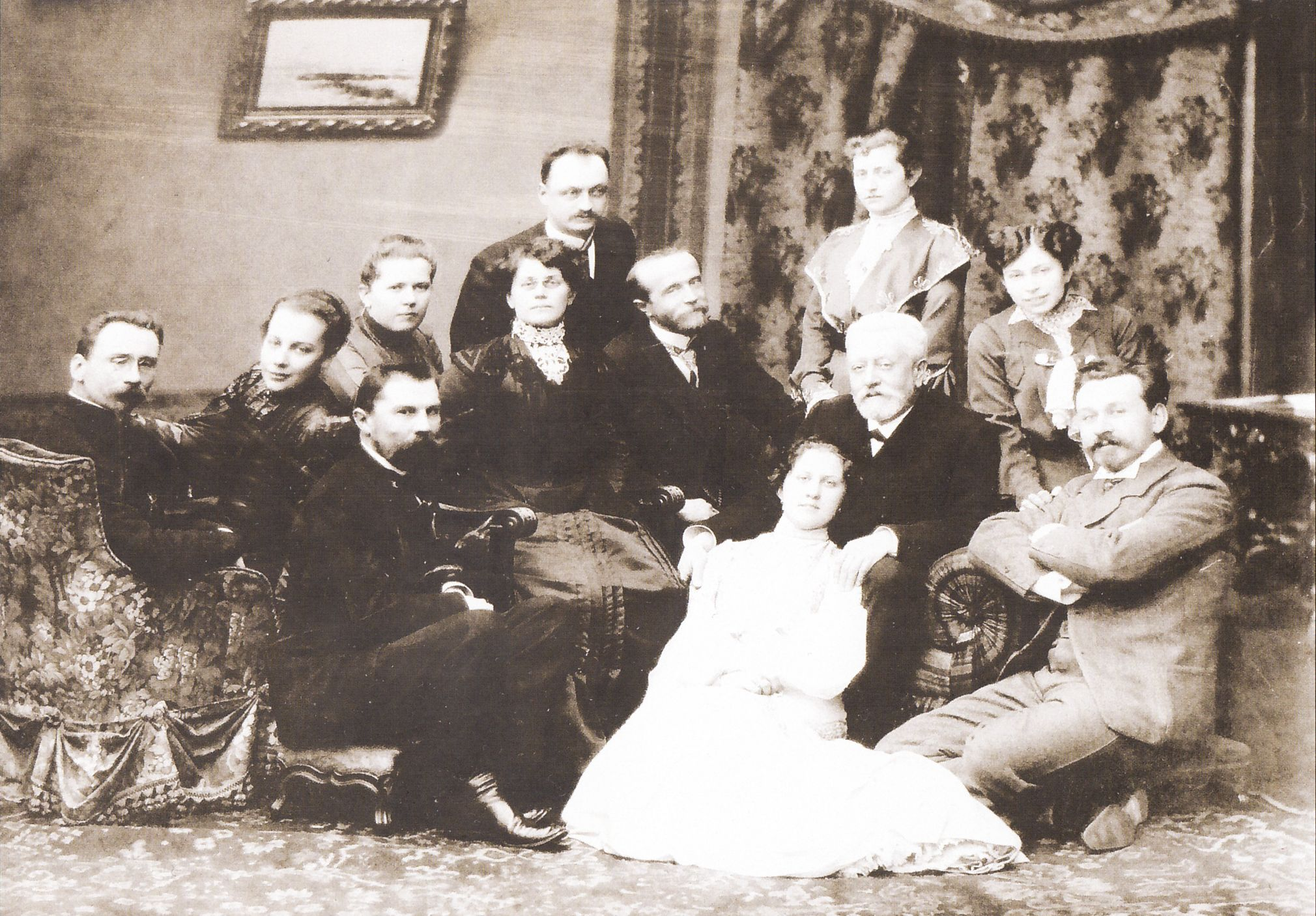 Семья В. Д. Носова. 1900-е годы. Фотография из архива Е. Л. Щербачевой.